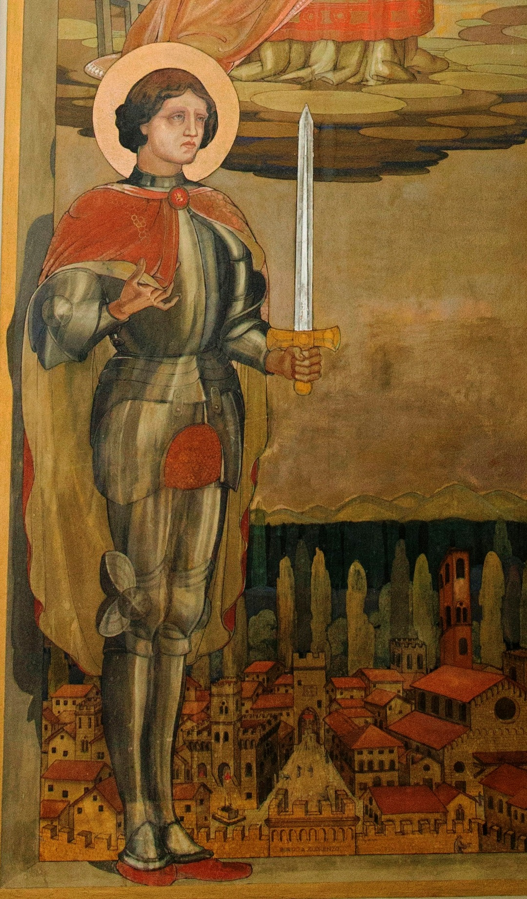 Affresco con san martino neel'atrio al primo piano del palazzo comunale